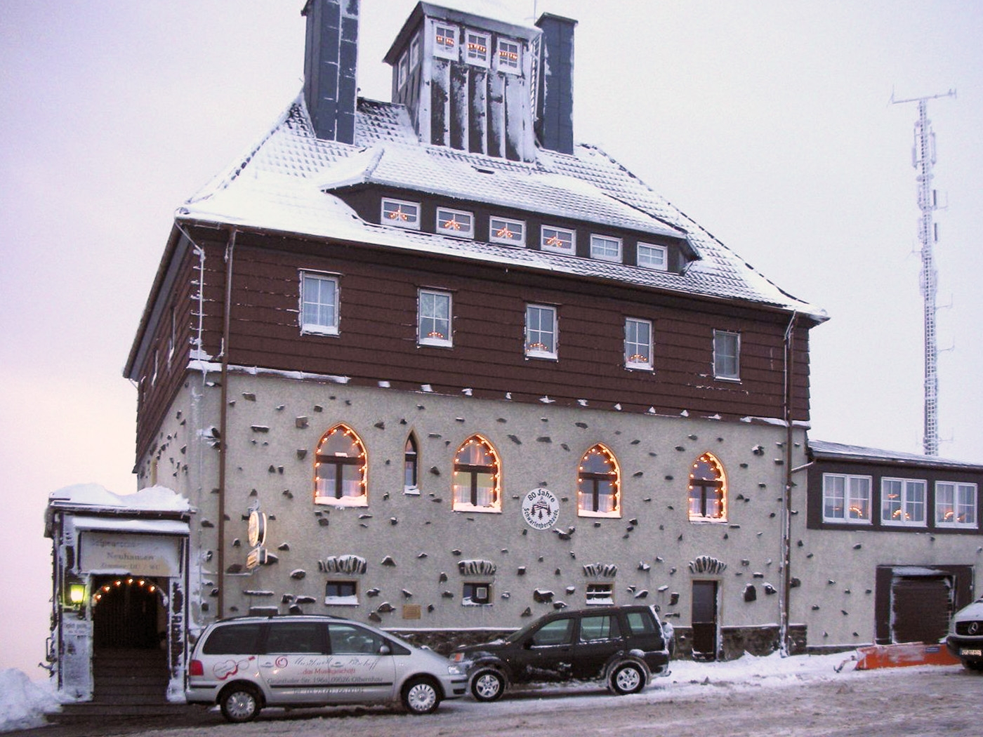 Bergbaude auf dem Schwartenberg im Winter